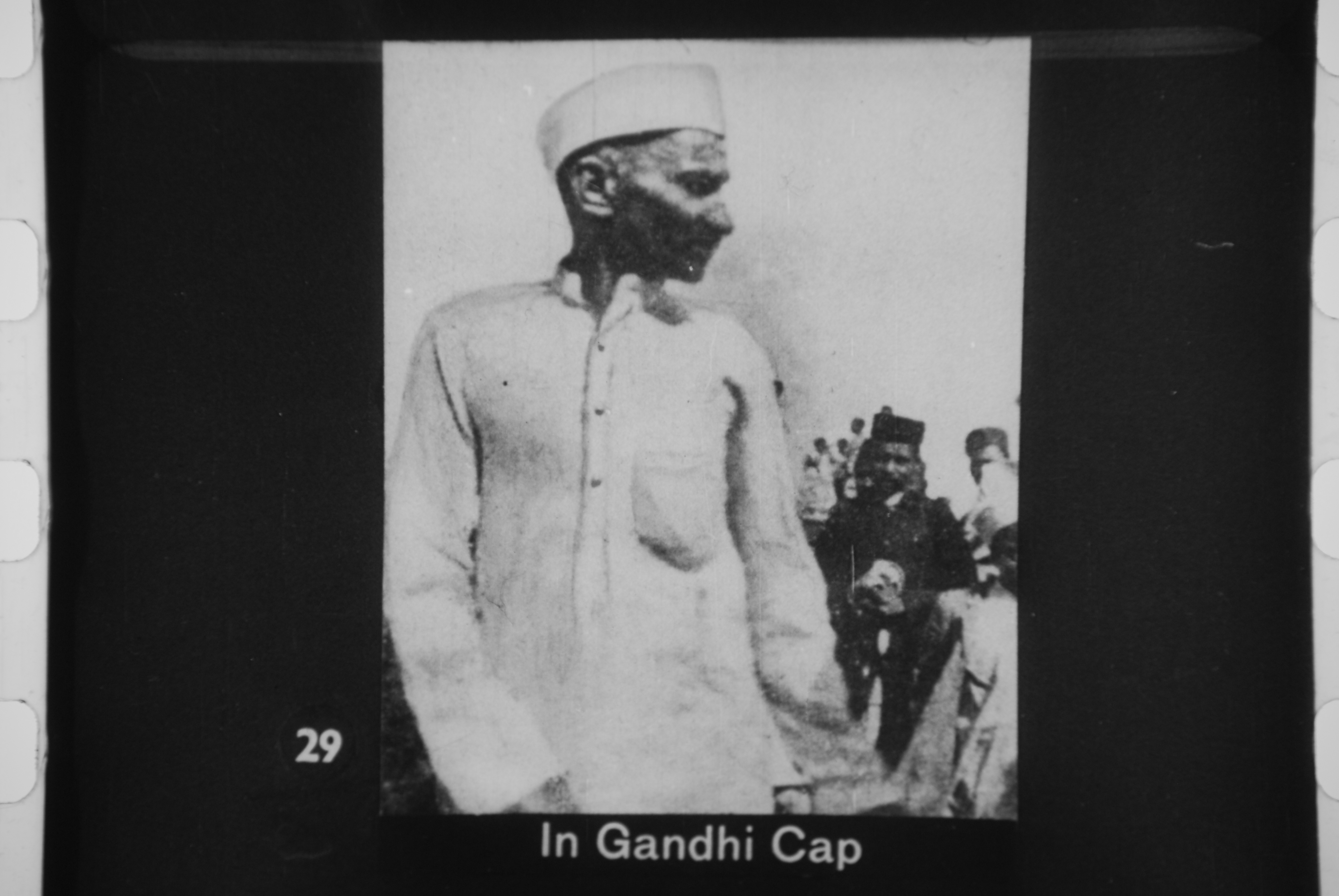 Gandhi cap